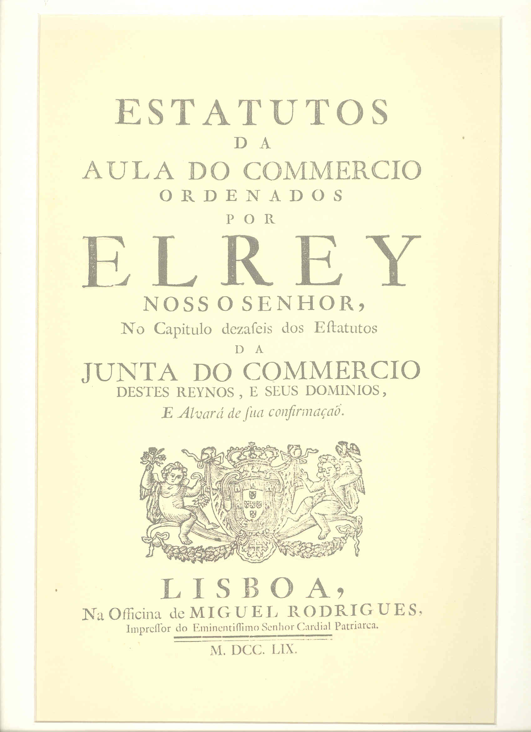 Facsimile do frontispício da Aula do Comércio